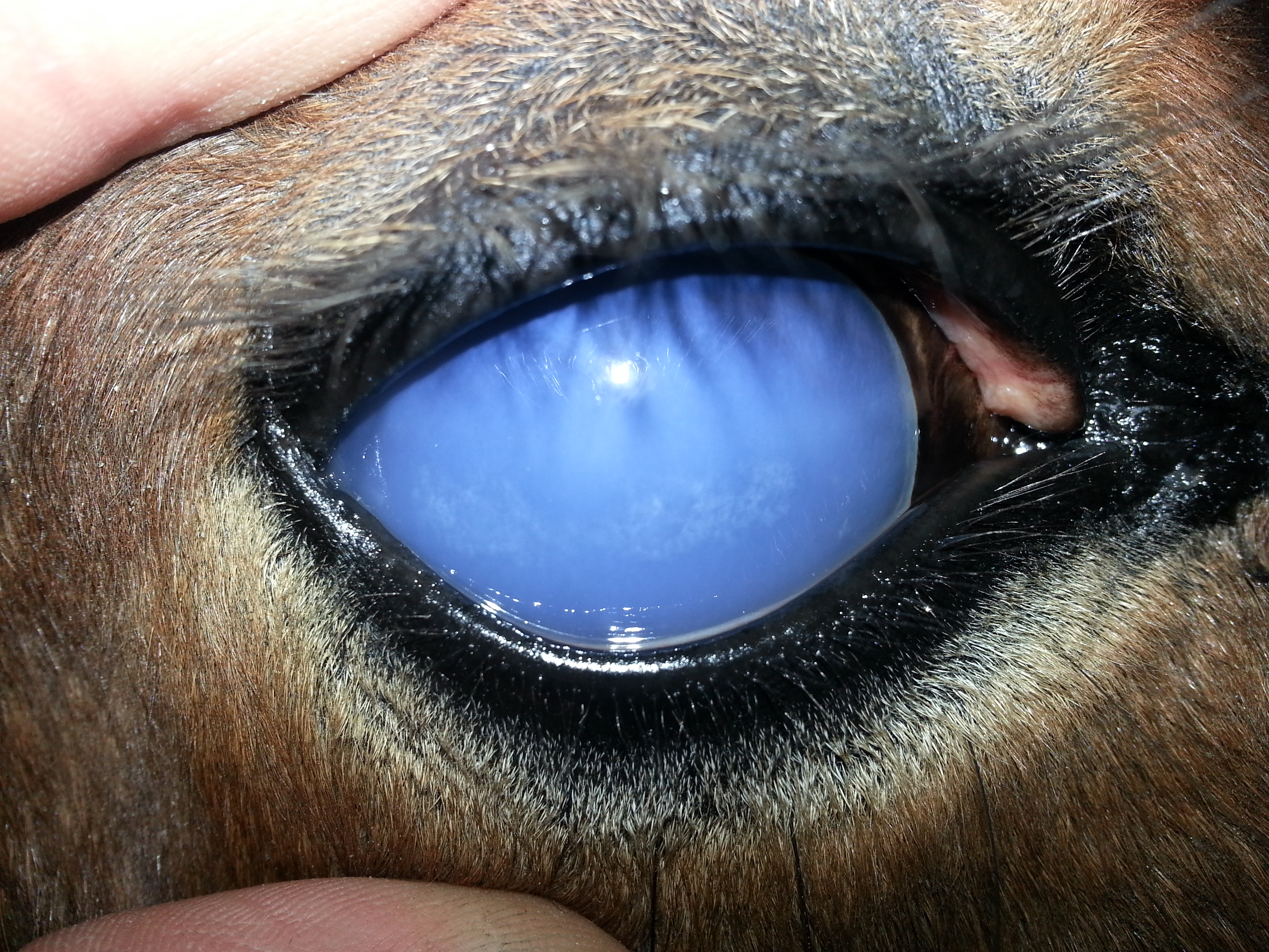 Mondblindheit